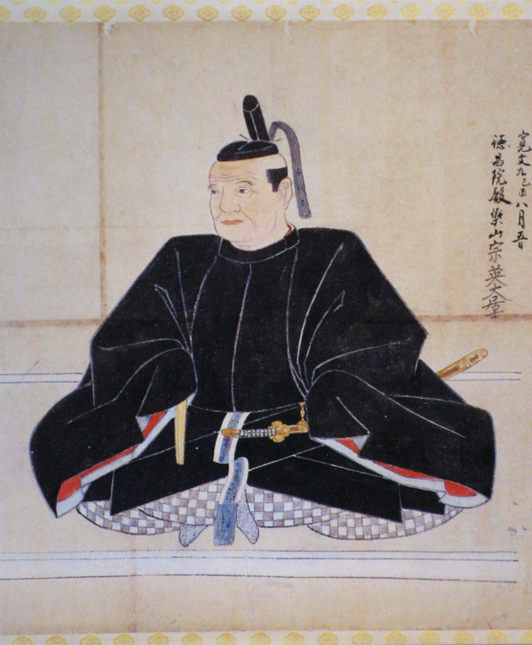 山内忠豊の肖像画